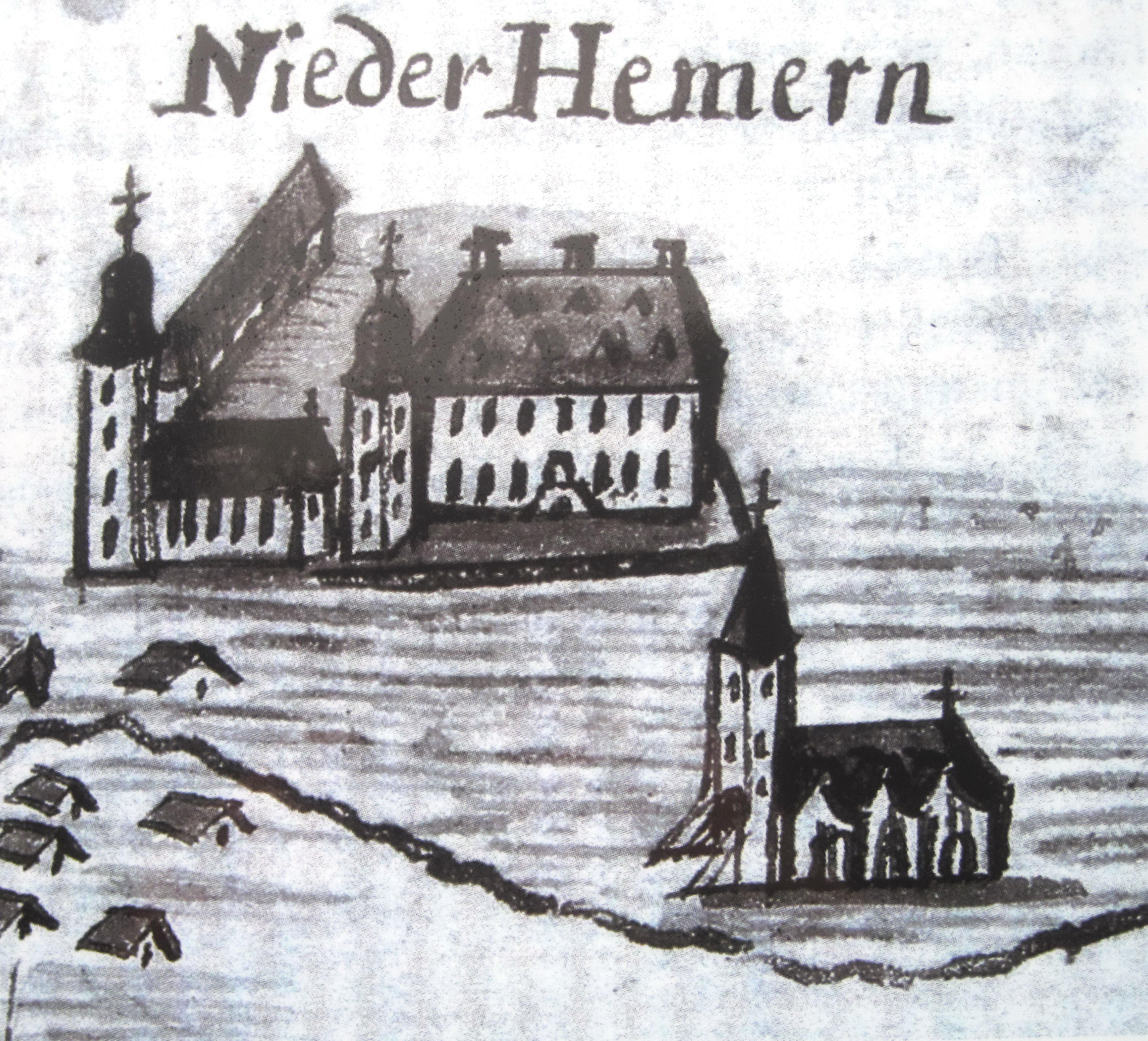 Zeichnung einer "Carte von der Hemer Marcke" (1767) des königlich vereidigten Landvermessers Johann Heinrich Merner auf welcher Haus Hemer, St. Peter und Paul und im Vordergrund die Vituskirche zu sehen sind.